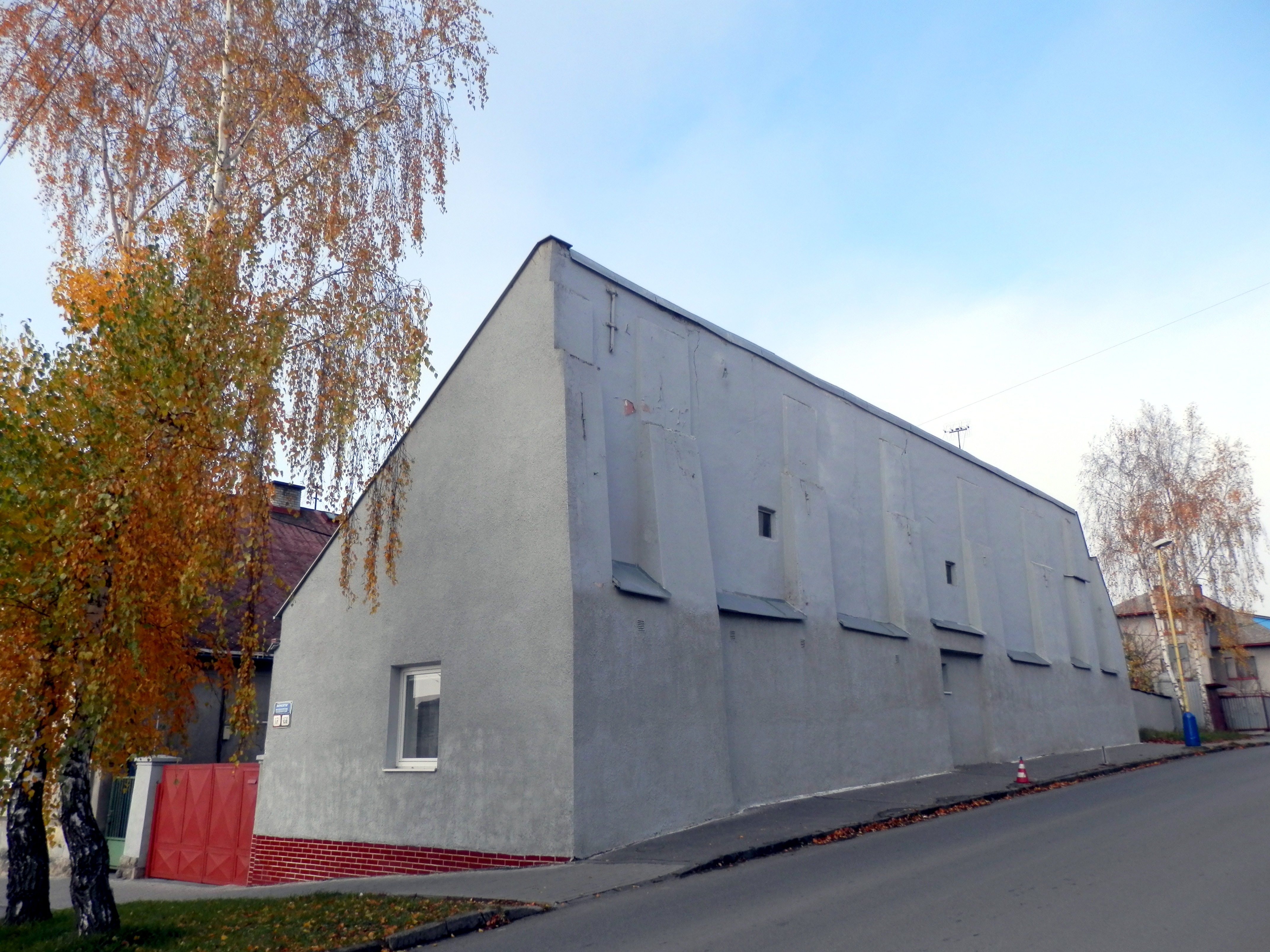 Solivar námestie Osloboditeľov 17. Mesto Prešov. Národná kultúrna pamiatka -dom remeselnícky